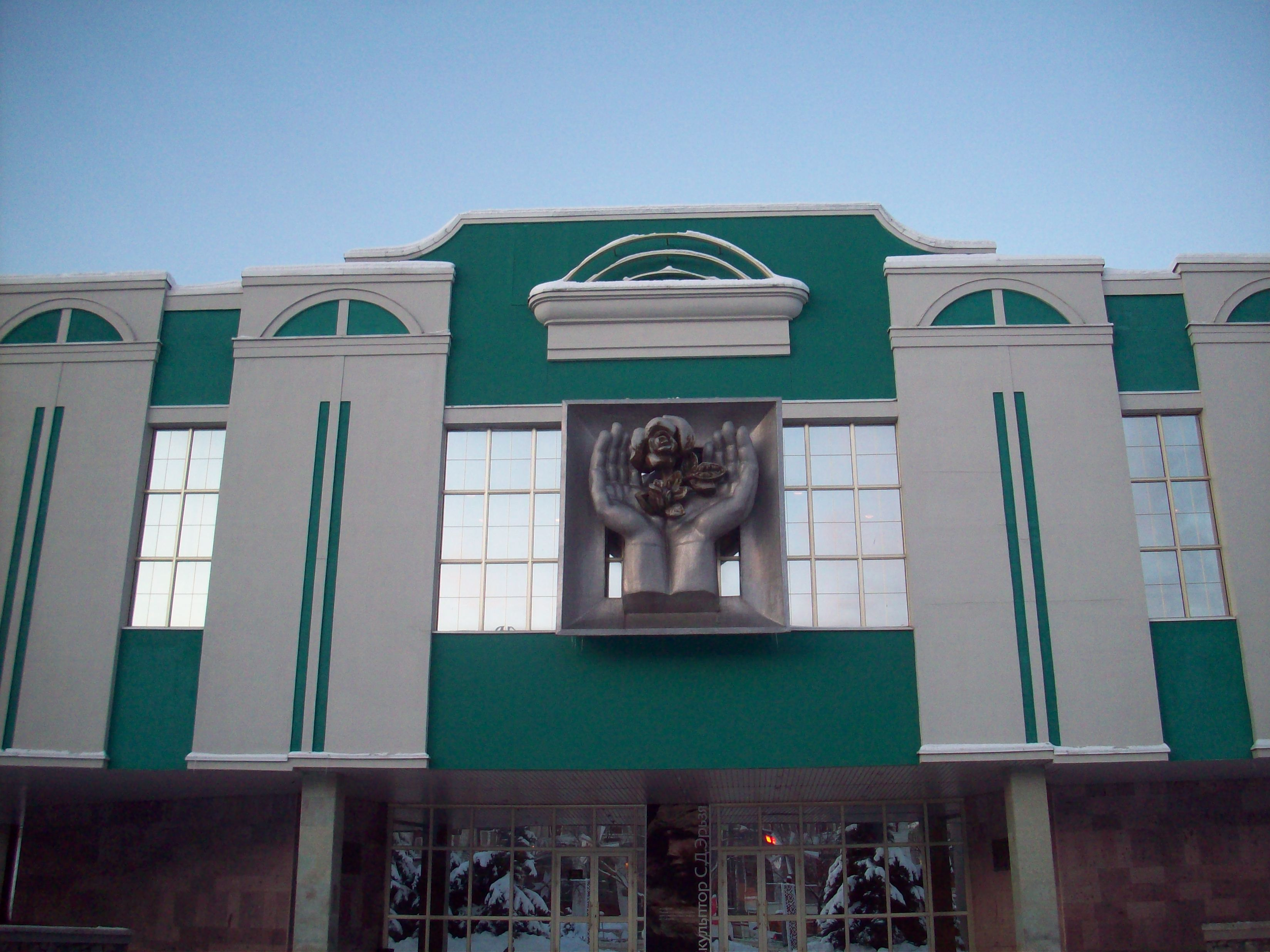 Мордовский республиканский музей изобразительный искусств имени С.Д. Эрьзи - крупное научно-исследовательское, научно-просветительское учреждение Поволжья.